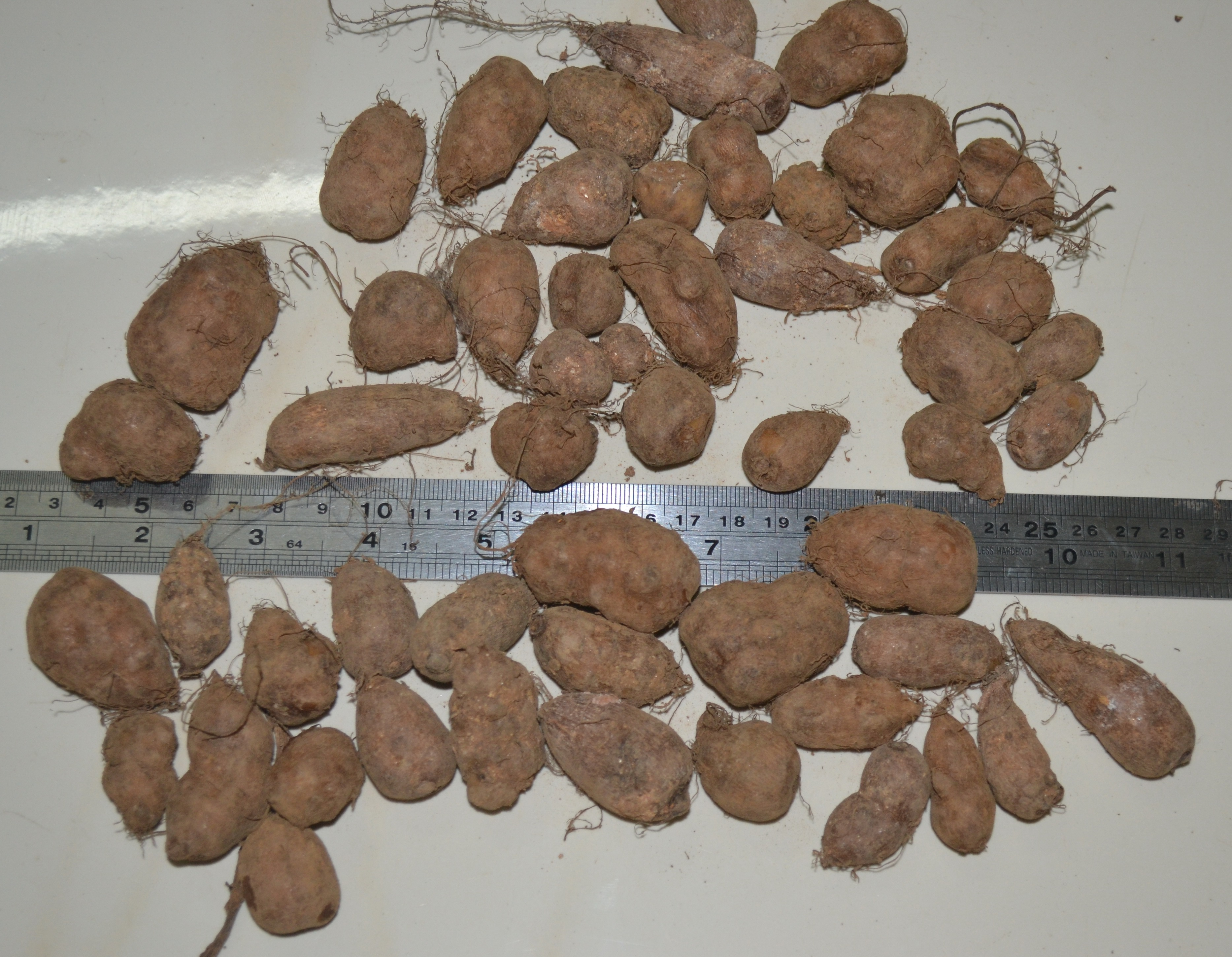 കൂർക്ക (കിഴങ്ങ്) Plectranthus rotundifolius